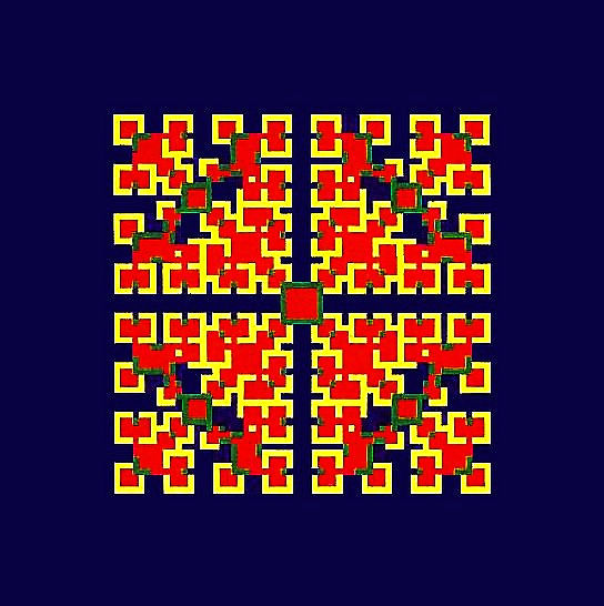 基于基本空间演化博弈模型演化30代后的截图图像，其中b=1.9